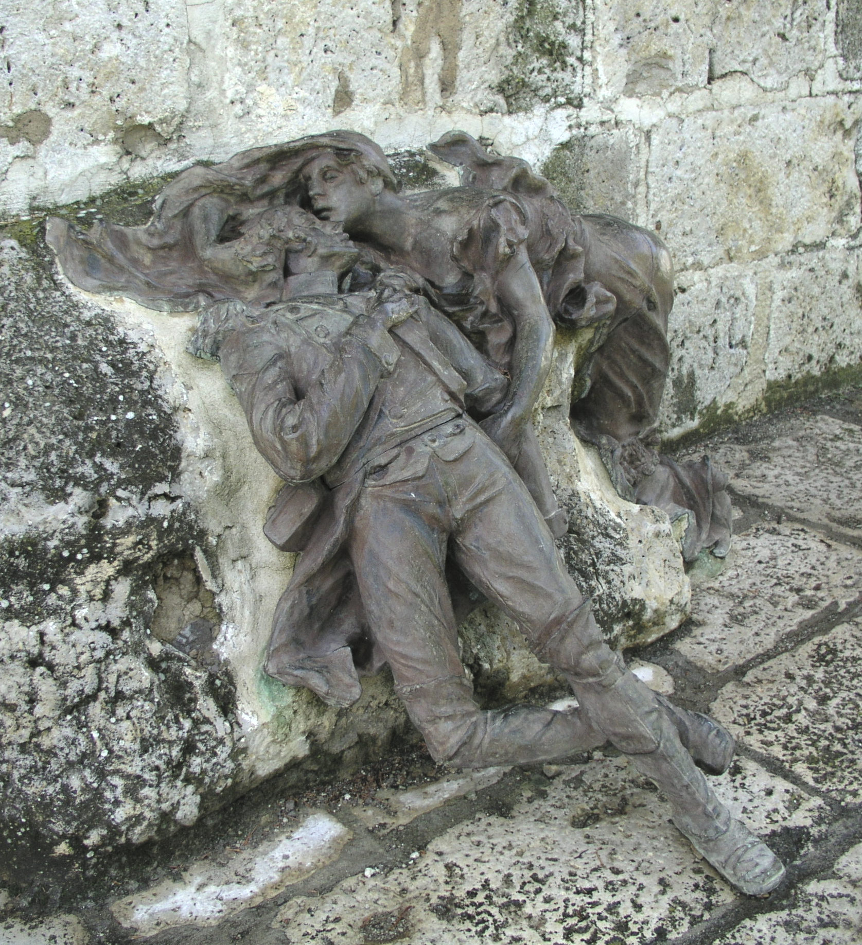 Monumento a los héroes de la batalla del Moclín, o de Medina de Rioseco (1808), erigido en 1908. Bronce de Aurelio Carretero (1863-1917).